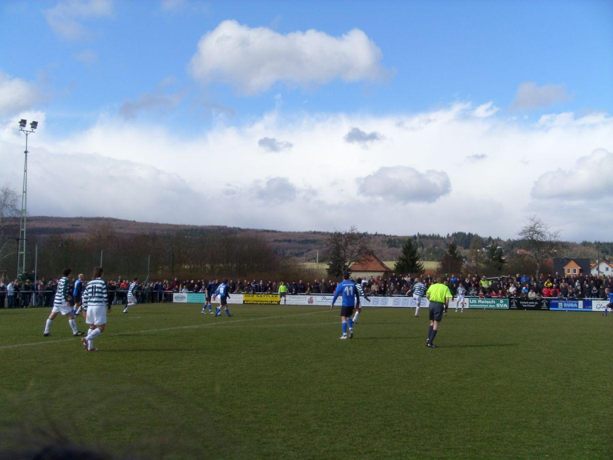 Oberligaspiel Alemannia Waldalgesheim - 1. FC Saabrücken